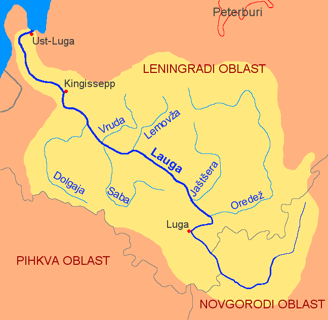 Lauga jõgi